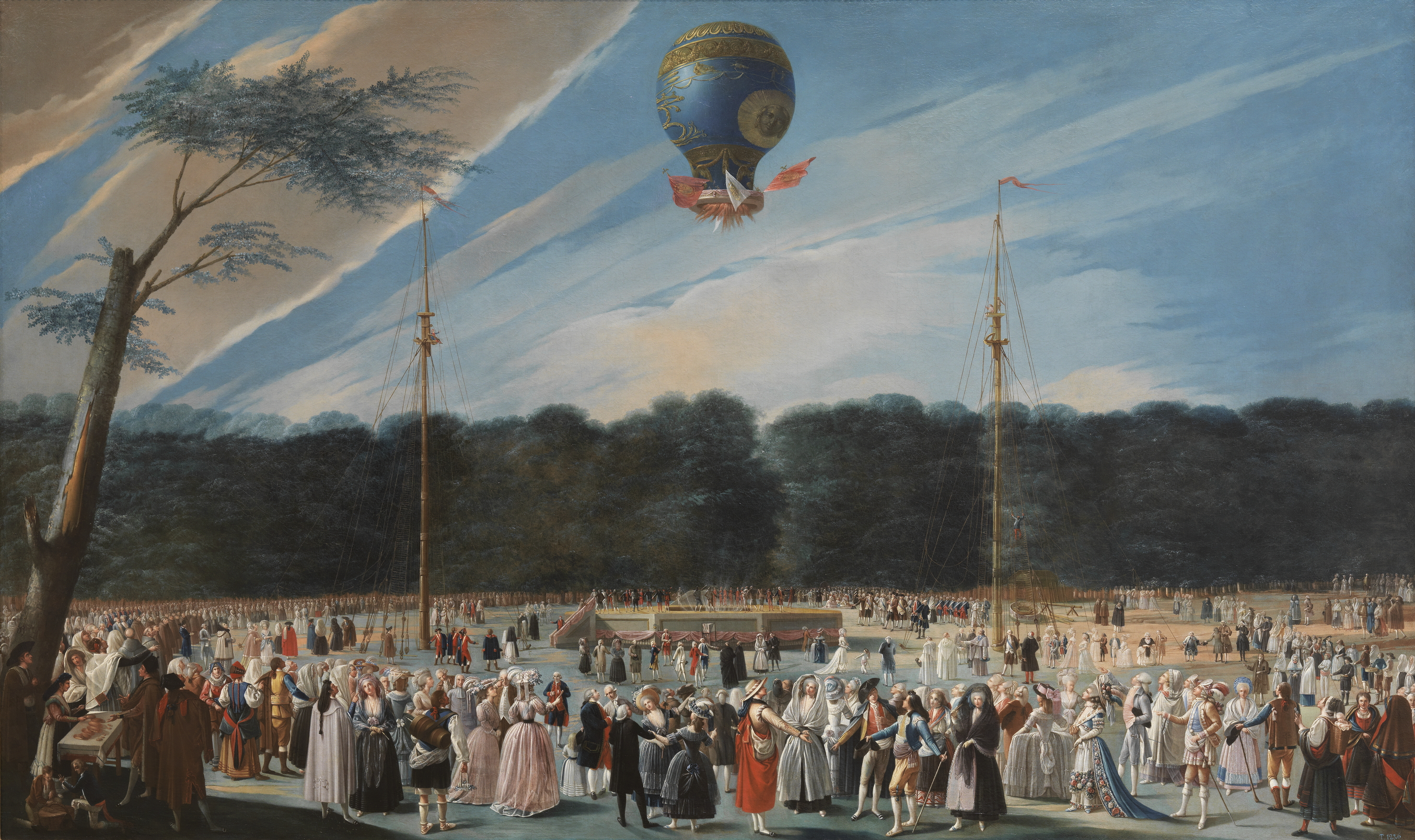 Carnicero, pintor secundario en el panorama artístico de la España de su tiempo, se convierte aquí en cronista de un hecho singular e histórico: la ascensión, que al parecer terminó de forma accidentada, de un globo Montgolfier por el francés Bouclé el 5 de junio de 1784 en los jardines de Aranjuez, en presencia de la familia Real, de la corte y del pueblo, vestido con los trajes característicos de majos y majas. La obra fue encargo de los duques de Osuna, de donde procede el lienzo. Otros autores relacionan el suceso con la ascensión de otro globo de estas características, por el marqués d'Arle y Pilastre de Rozier, el 23 de noviembre de 1783 en París.